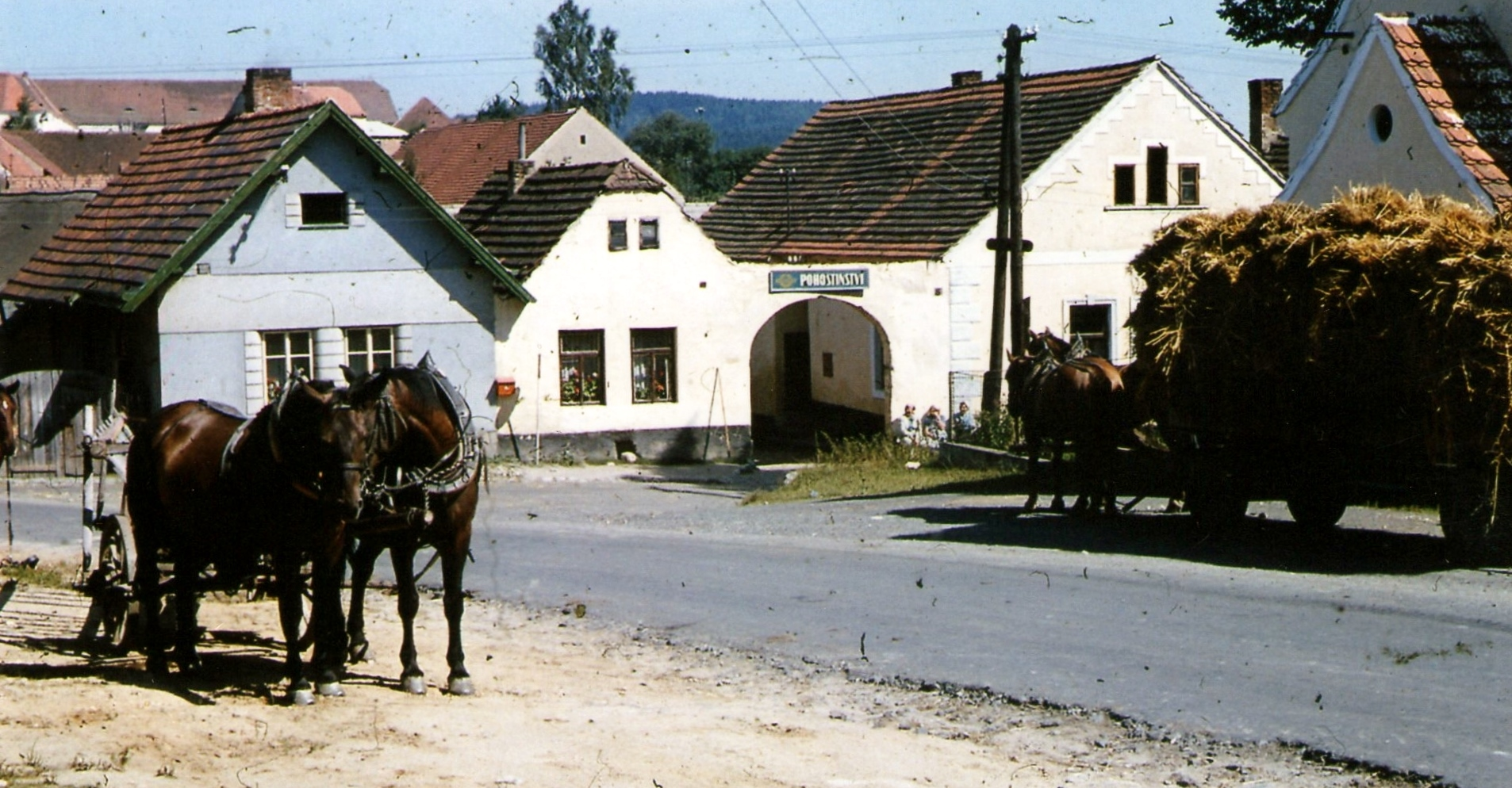 Hradiště